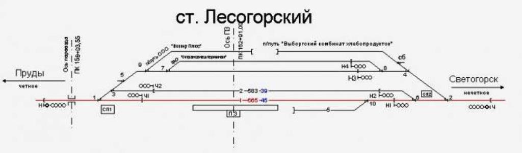 Ст. Лесогорский